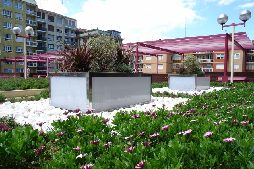 Pérgola, bancos de la Plaza Señorío de Vizcaya